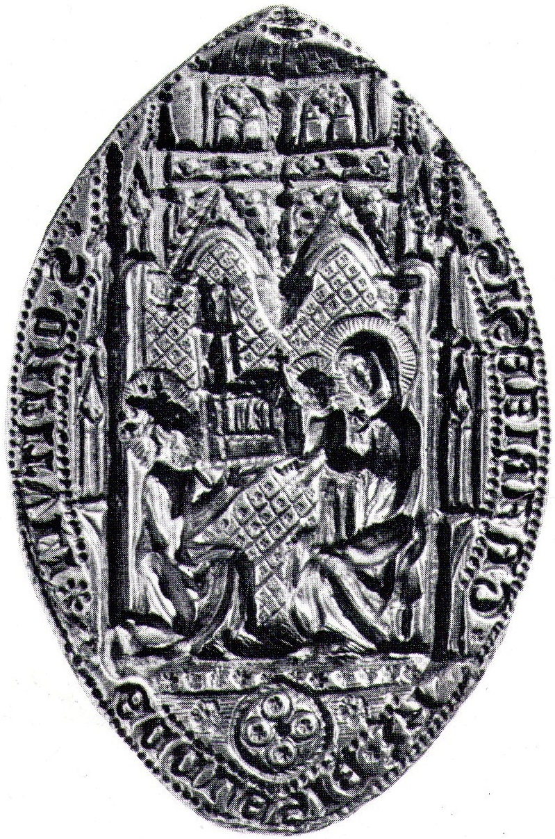 Pečat biskupskog Zagreba iz 15. st.